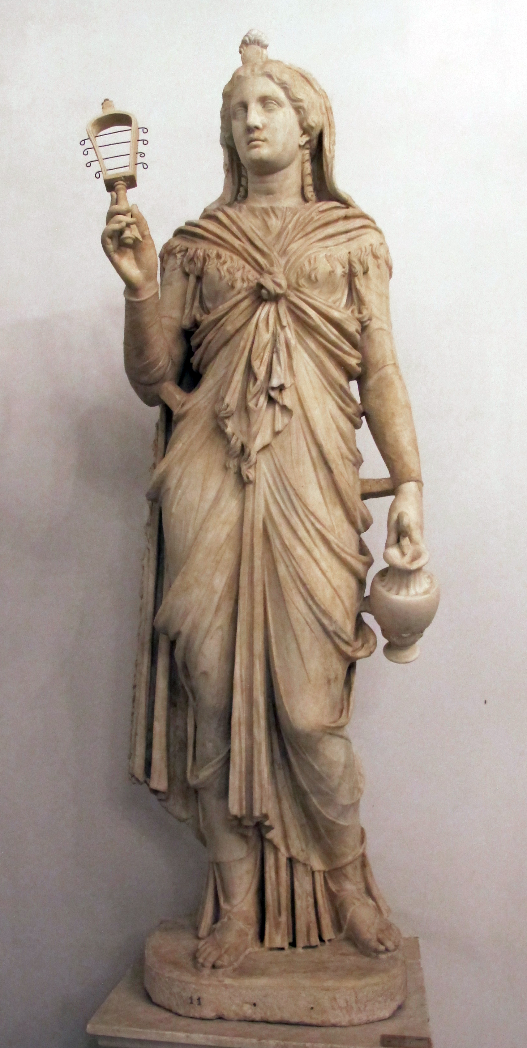 Musei Capitolini